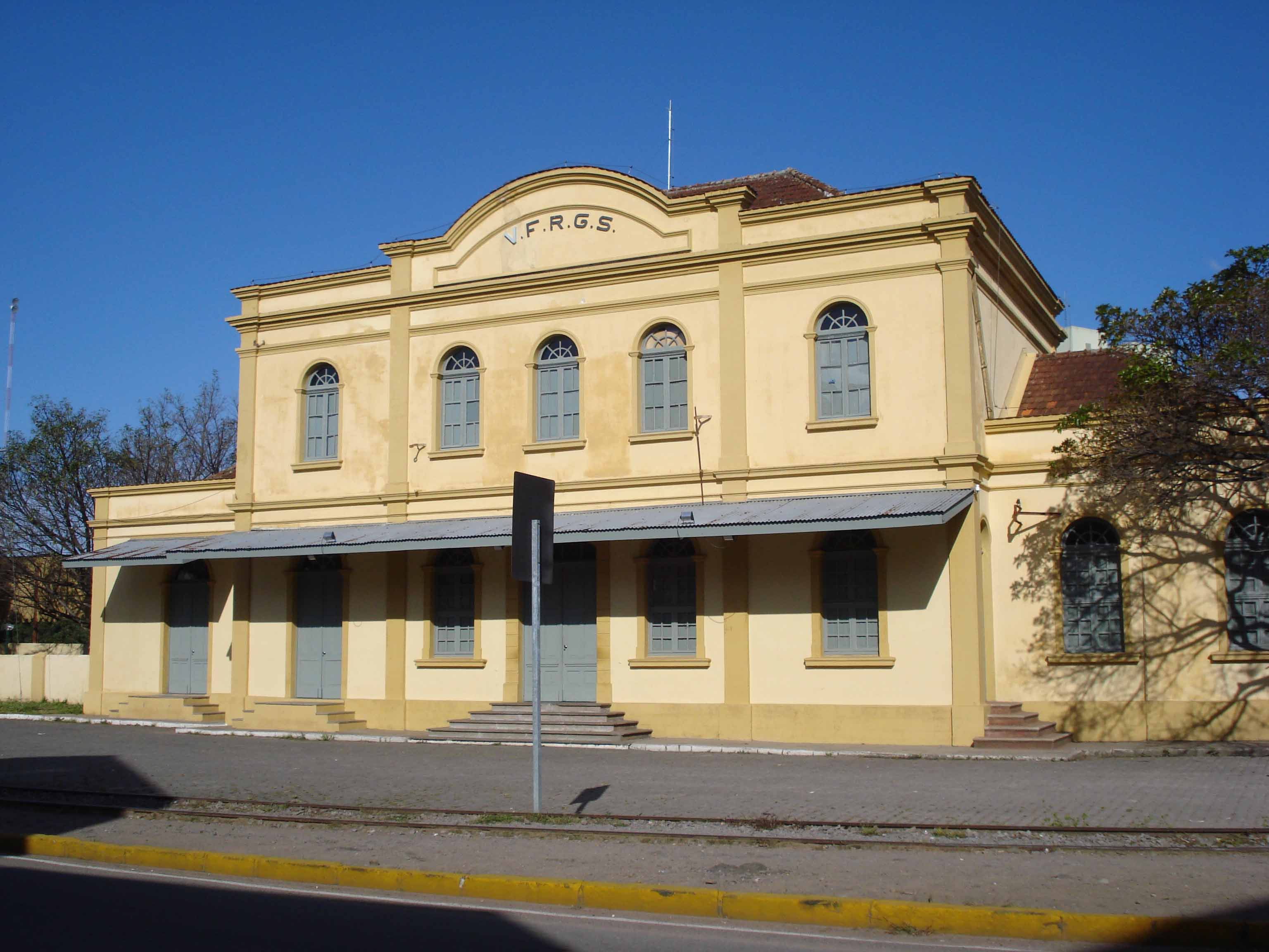 Estação ferroviáraia de Caxias do Sul